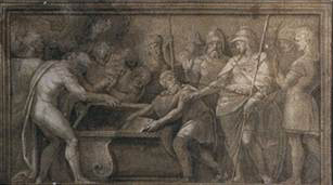 The Parnassus Fresco, width at base 670 cm Stanza della Segnatura, Palazzi Pontifici, Vatican